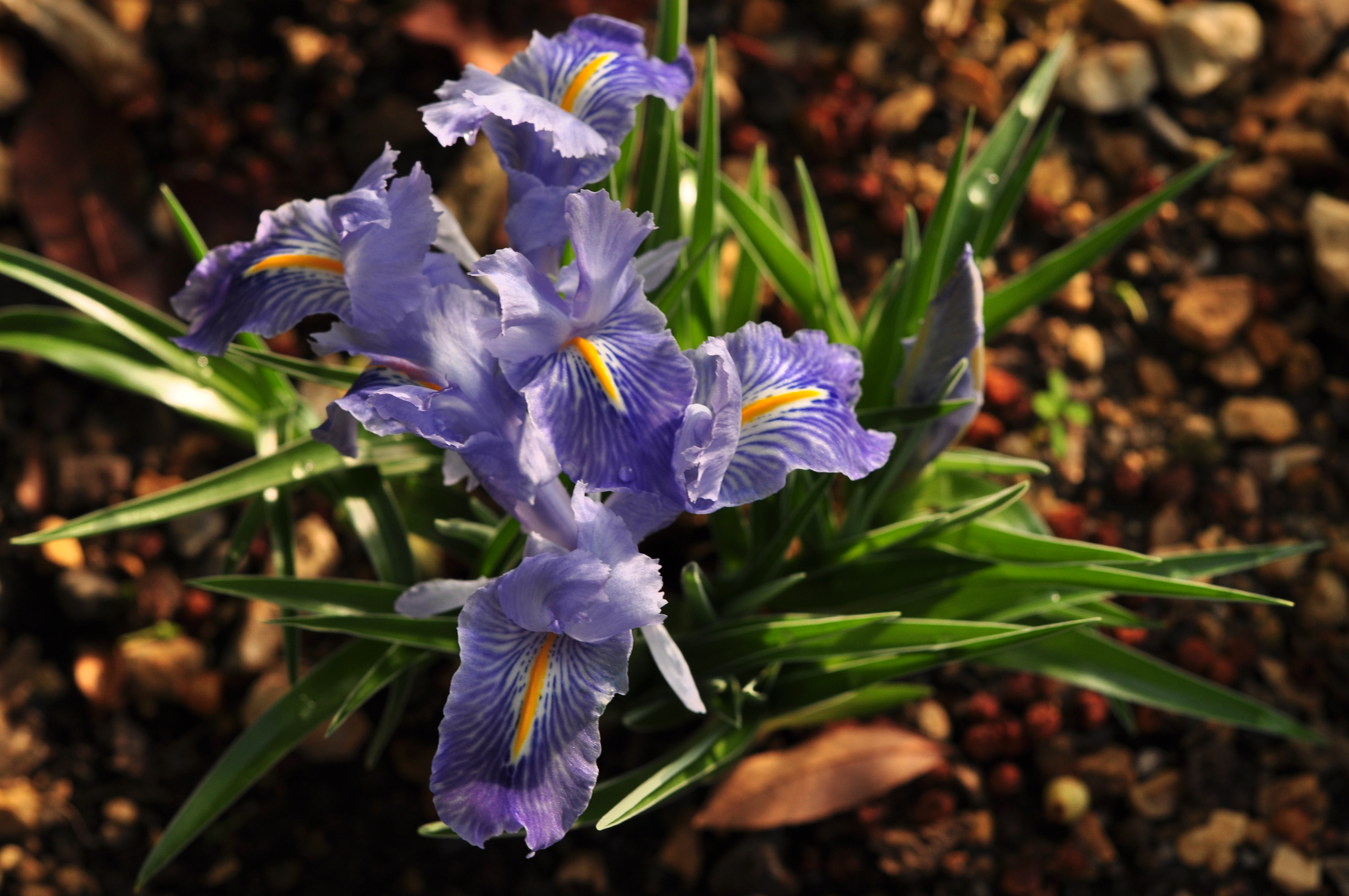 Iris planifolia Fiori et Paol.